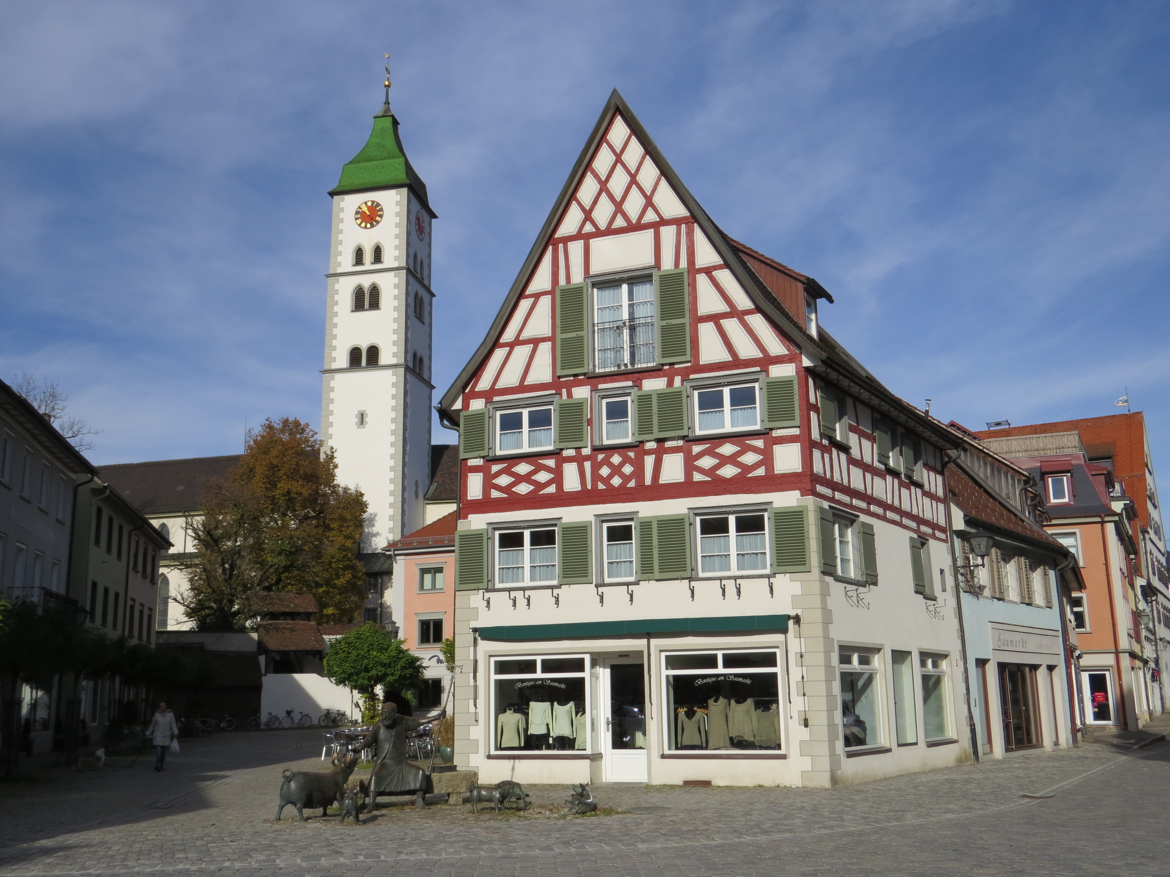 Am Saumarkt, Wangen im Allgäu